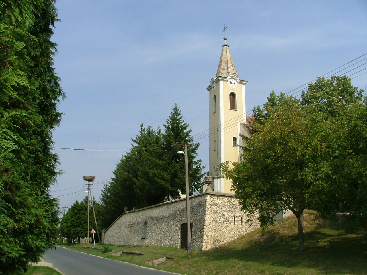 Georg (Heiliger) Kirche in Oszkó